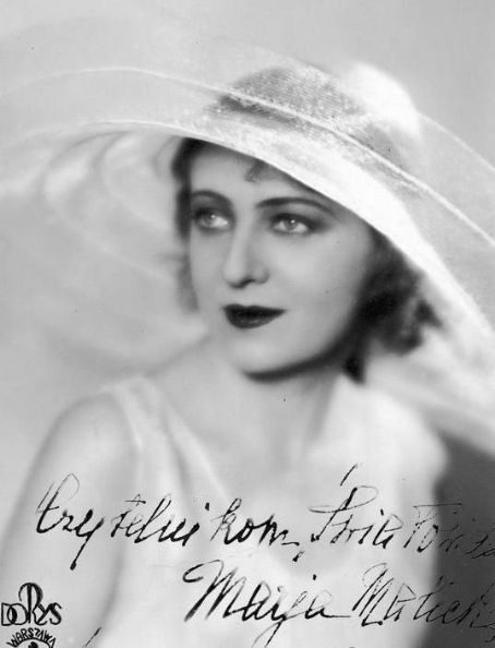 Aktorka Maria Malicka (1900-1992).